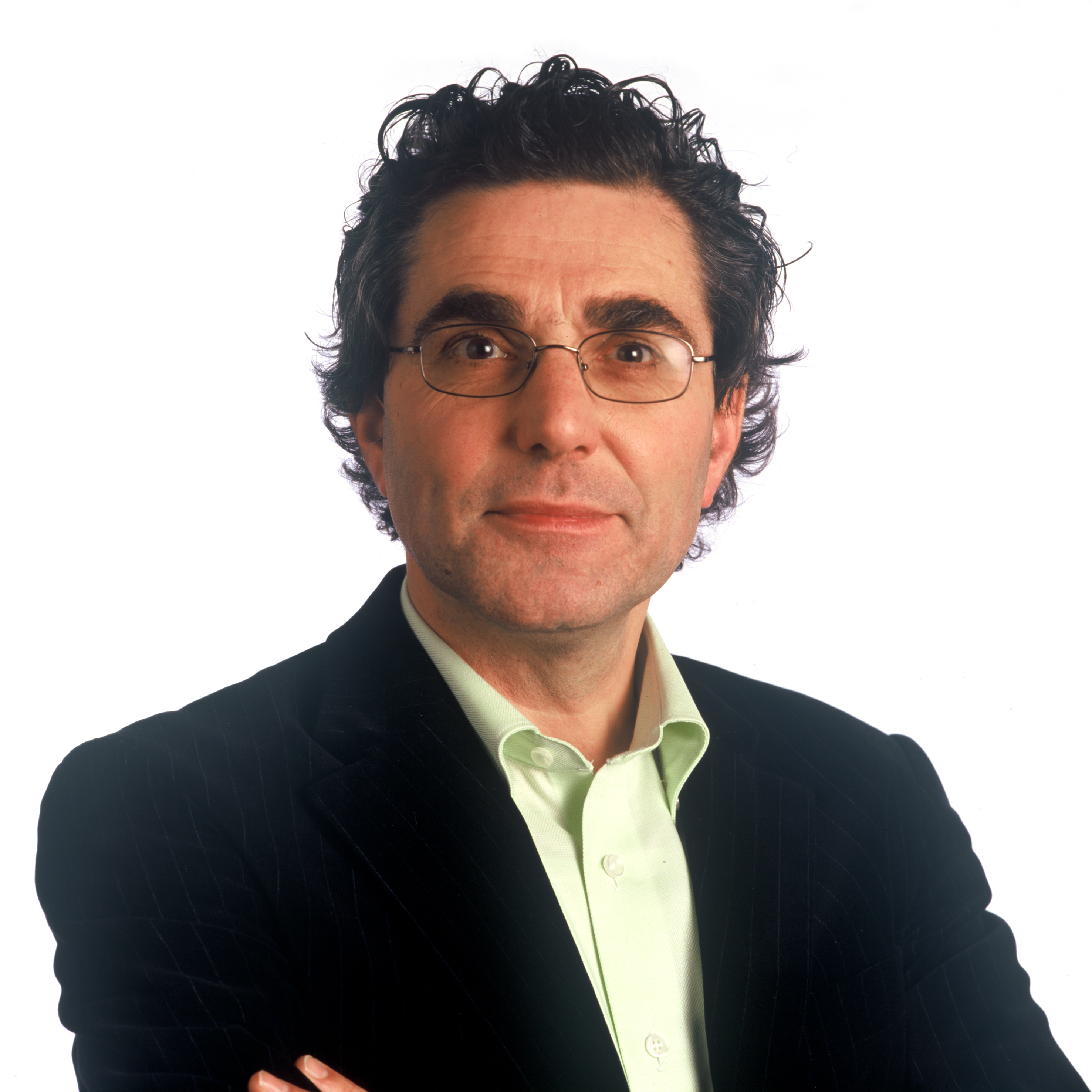 Henk van Gerven